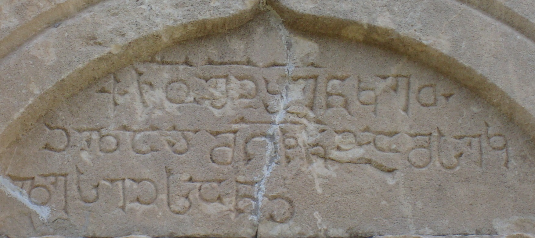 მრავალძალის კიდურწაისრული წარწერა